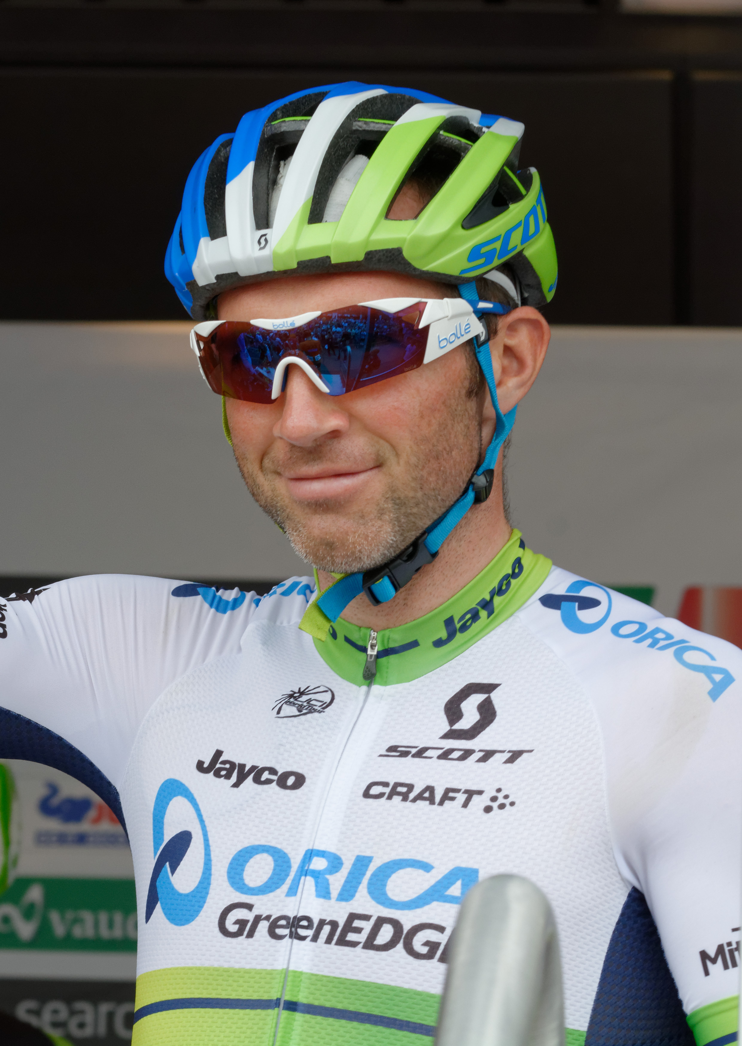 D71_9942_DxO